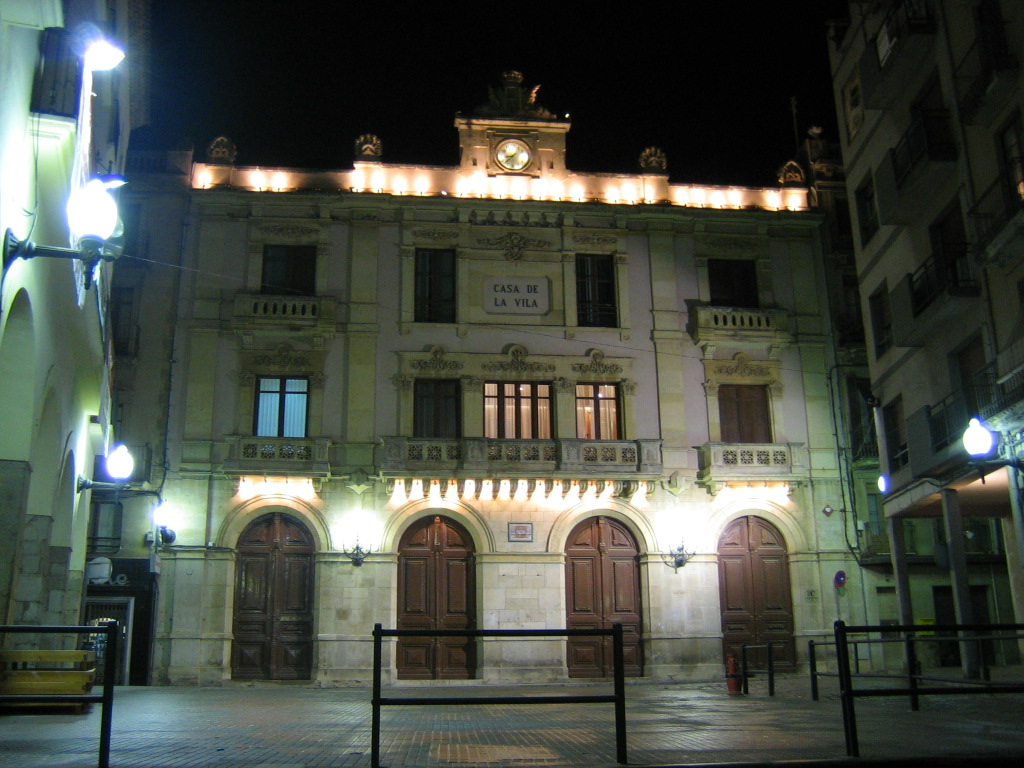 Ajuntament de Valls, Alt Camp, Catalunya.Plaça del Blat. Valls